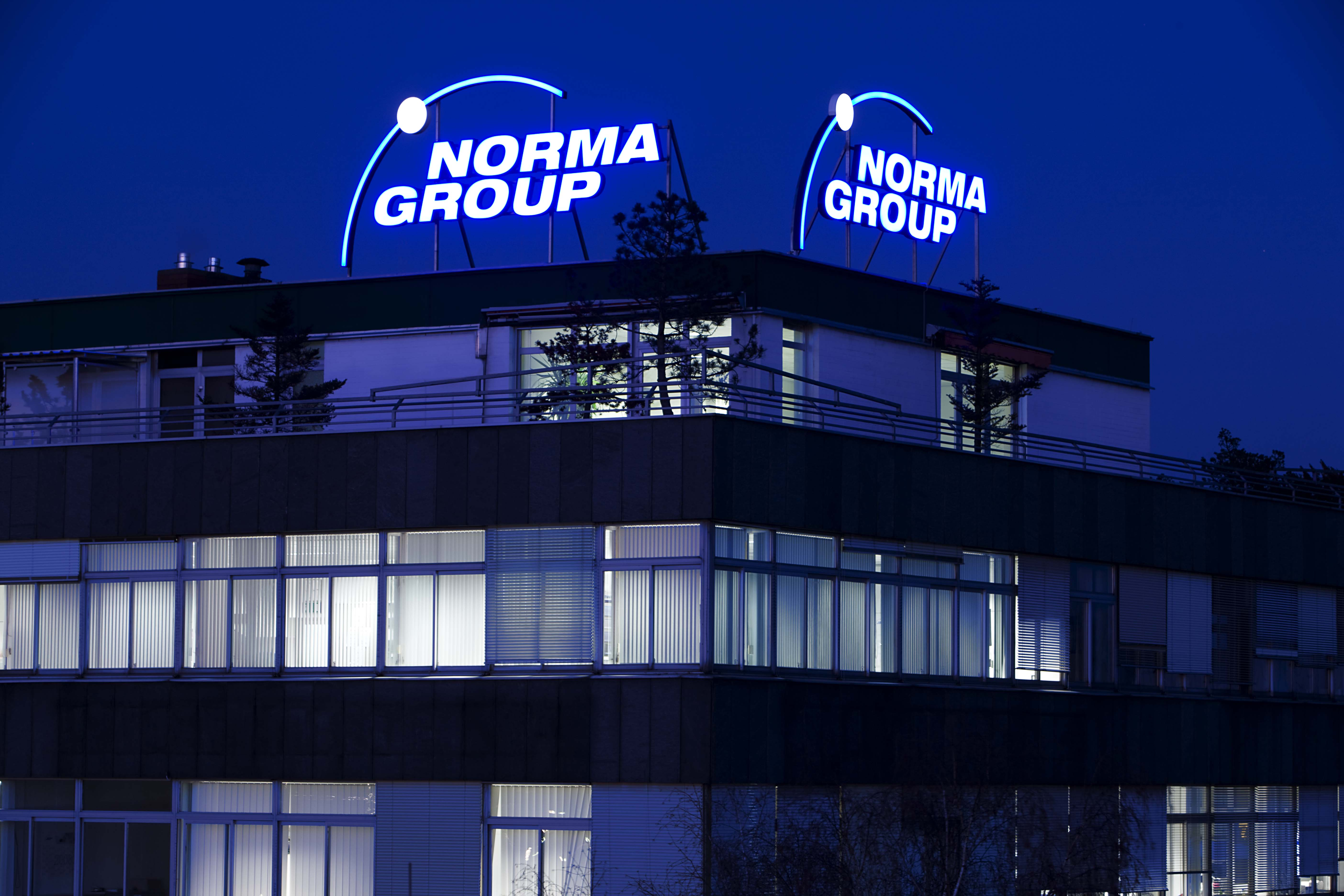 Firmensitz der NORMA Group in Maintal